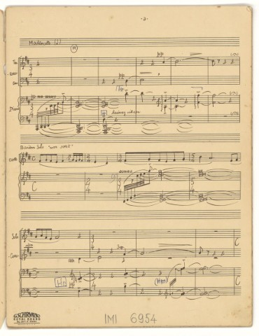 "תיקון חצות", בלט על נושאים תימניים, כת"י לתזמורת, 1957, עמוד ראשון (מס' קטלוגי: MUS 110 / A85)